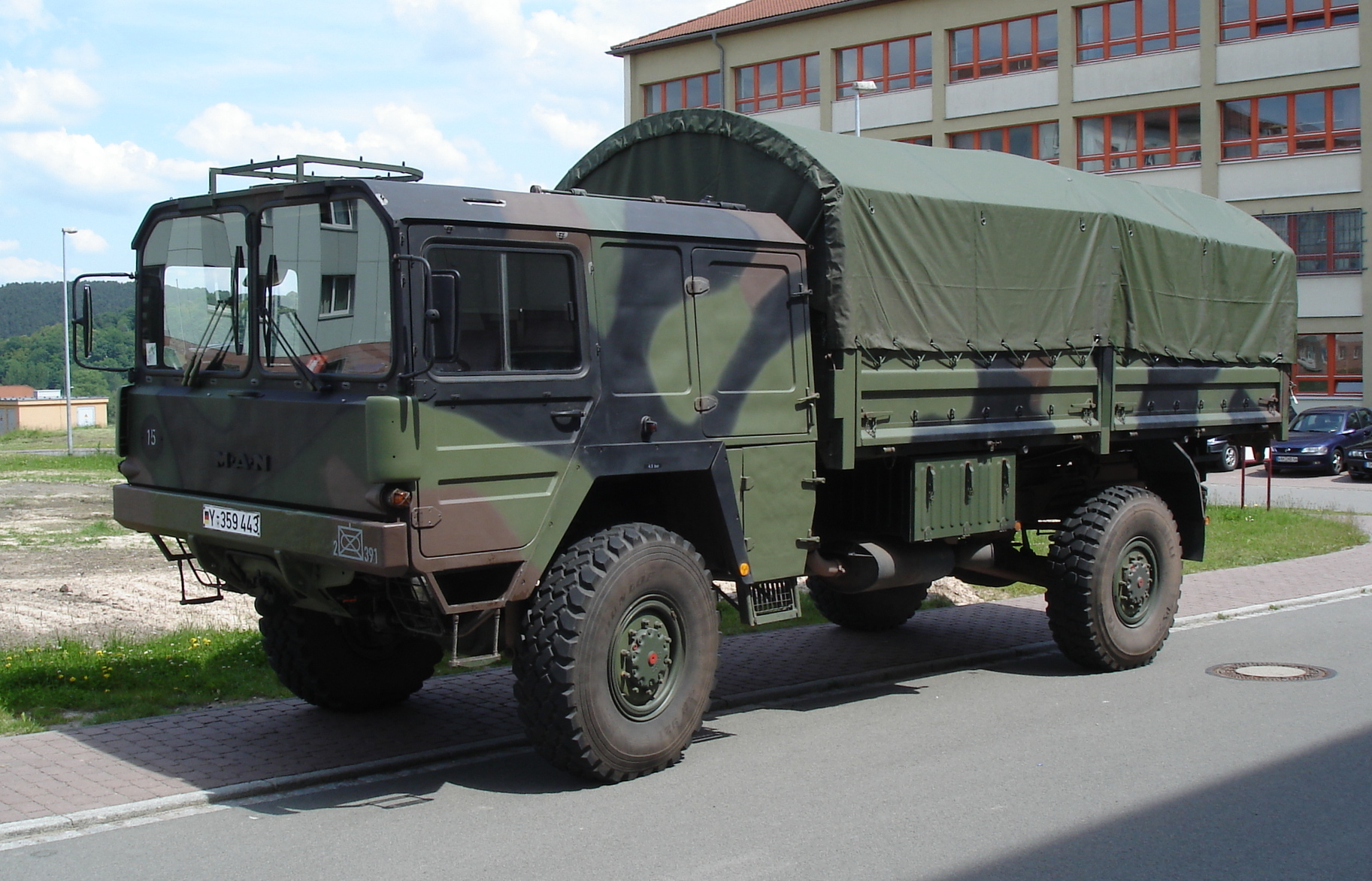 MAN 5to.gl des 2./Panzergrenadierbataillon 391 aus Bad Salzungen